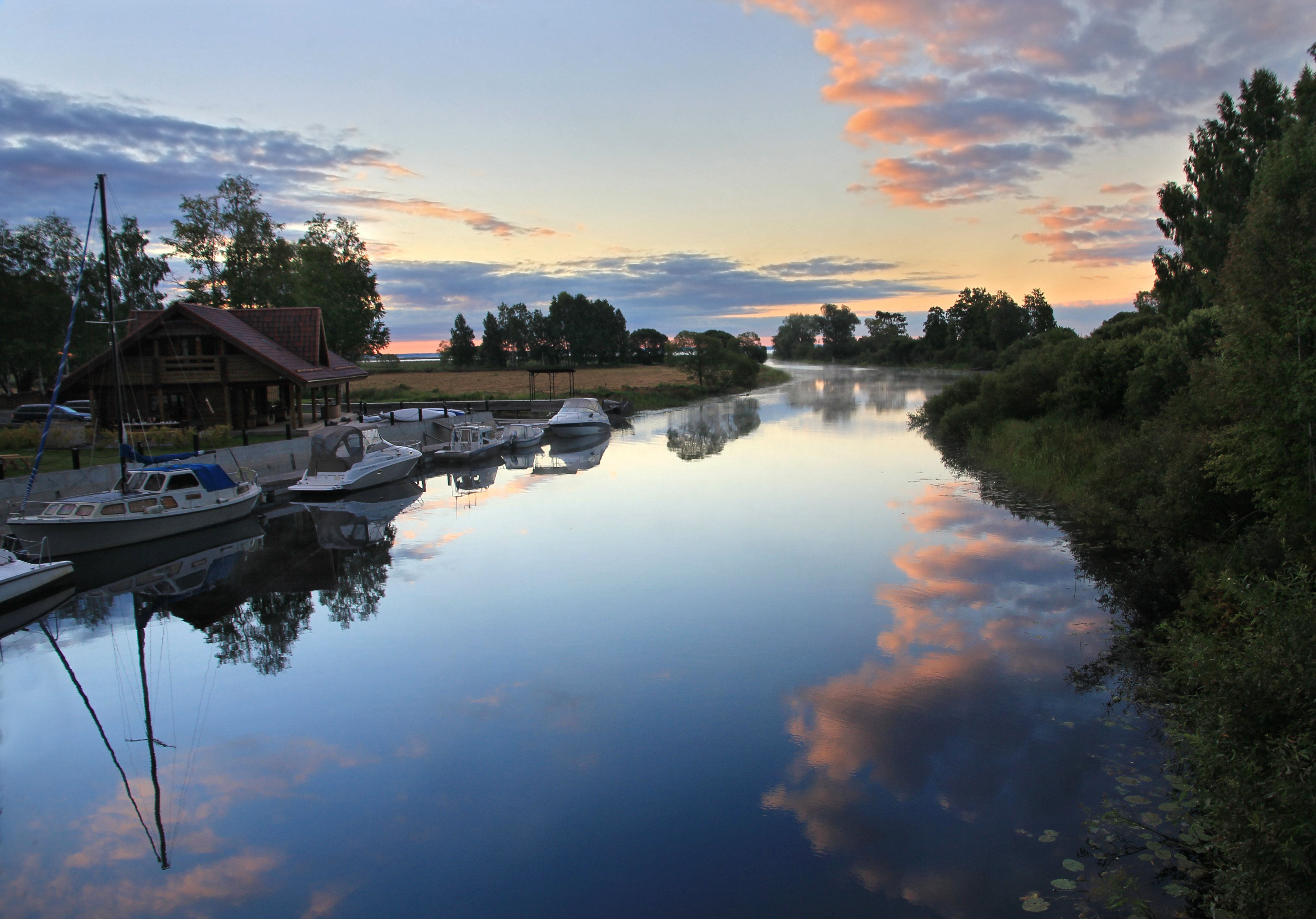 Oiu sadam Tänassilma jõe suudmes